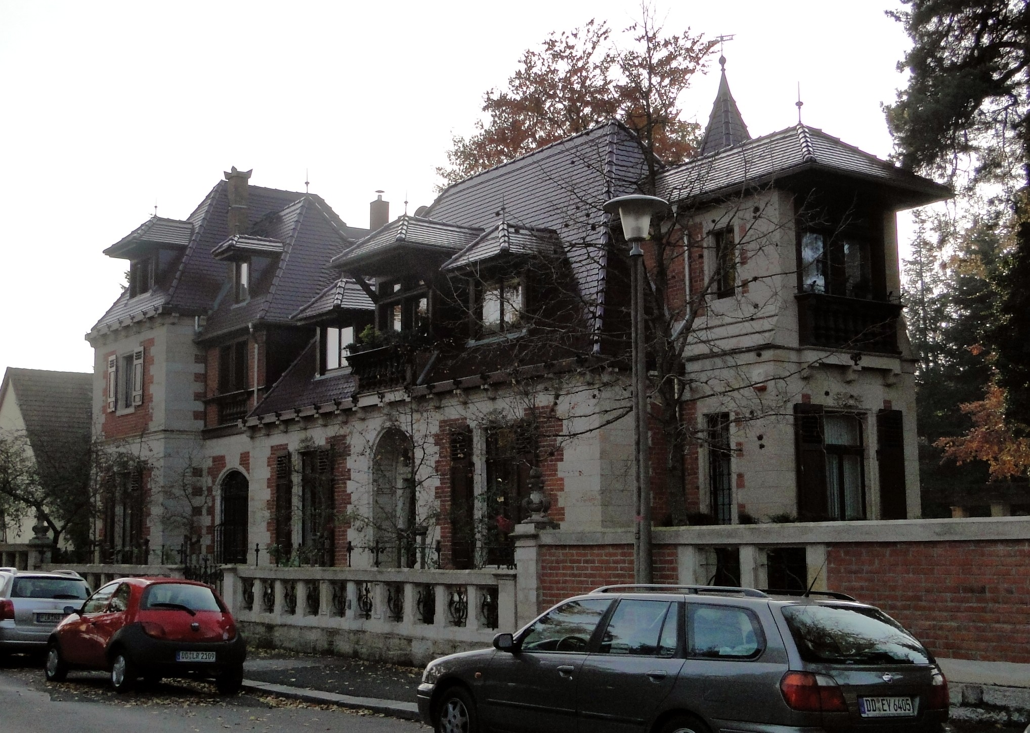 Die Villa Stock auf der Händelallee 14/16 in Dresden-Blasewitz